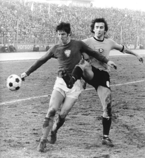 ADN-ZB-Kohls-21.2.76-str-Berlin: Fußball-Oberliga BFC Dynamo- SG Dynamo Dresden 3: 4-Reinhard Häfner (Dresden-r.) kann Harald Schütze von BFC nur schwer vom Ball trennen.In der Spitzenbegegnung am 21.2.konnte Dresden mit diesem Sieg die führende Position in der Oberliga-Tabelle ausbauen.